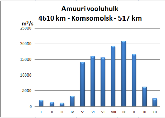 Amuuri vooluhulk